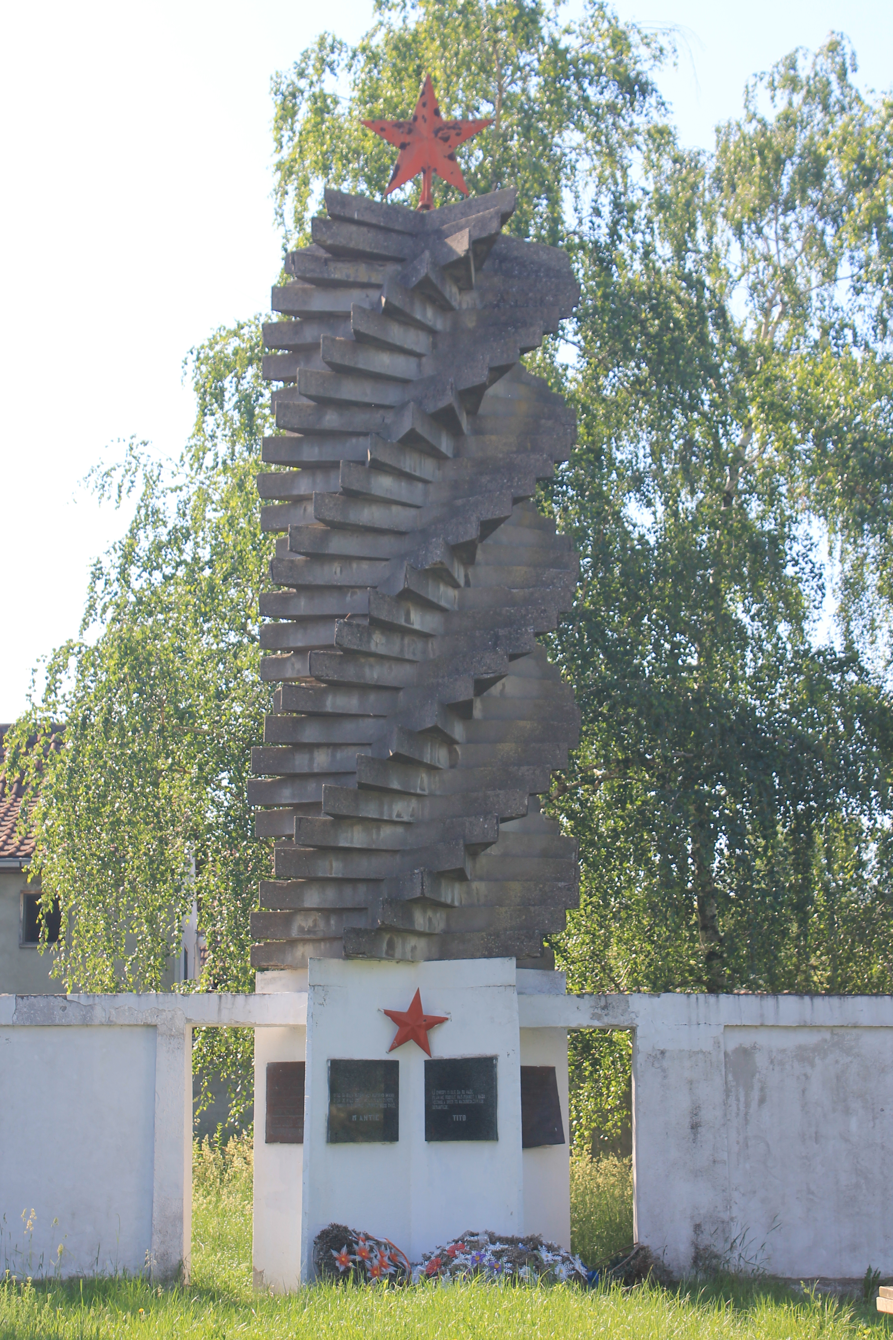 Sviloš, spomenik NOB-a